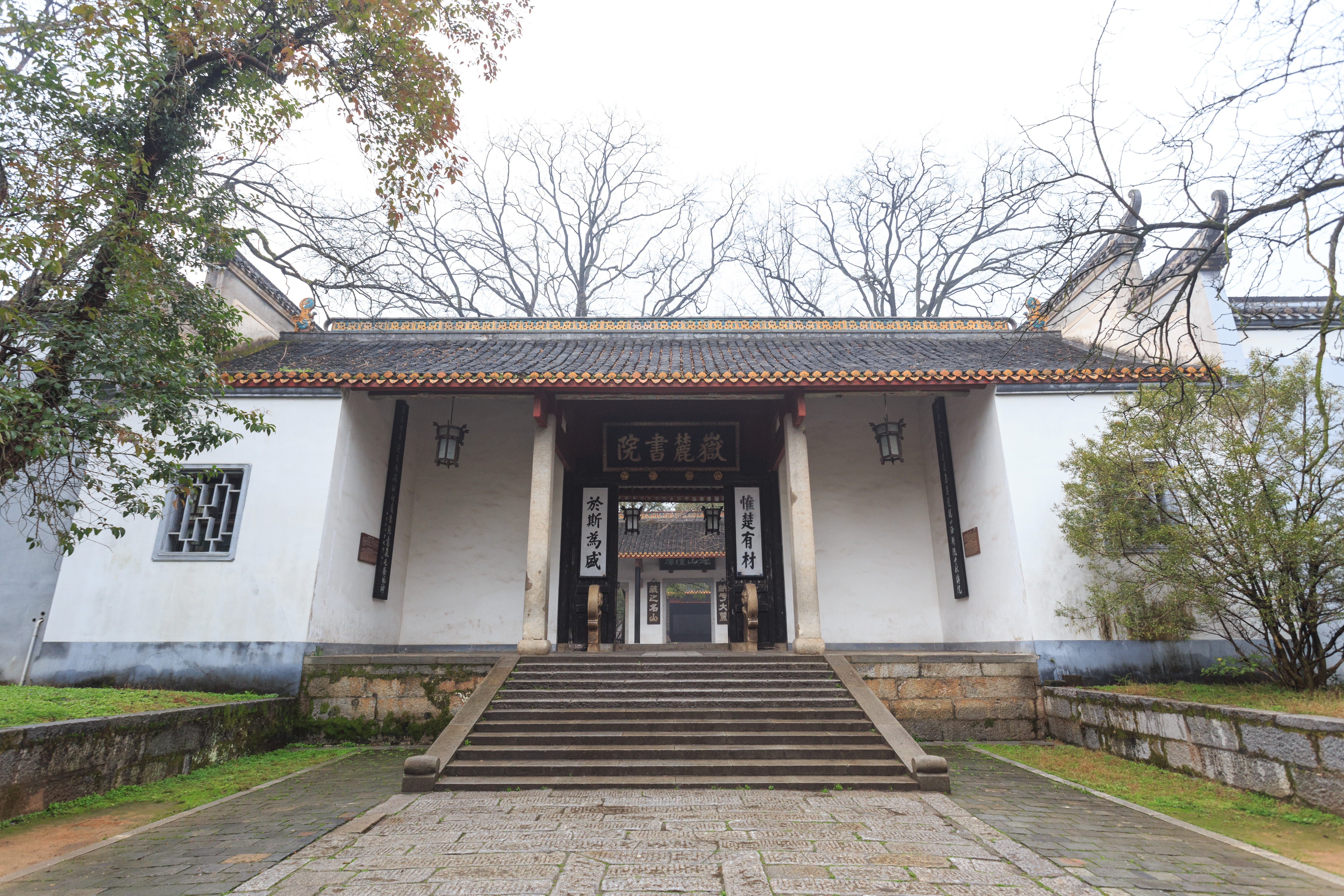 嶽麓書院 大門